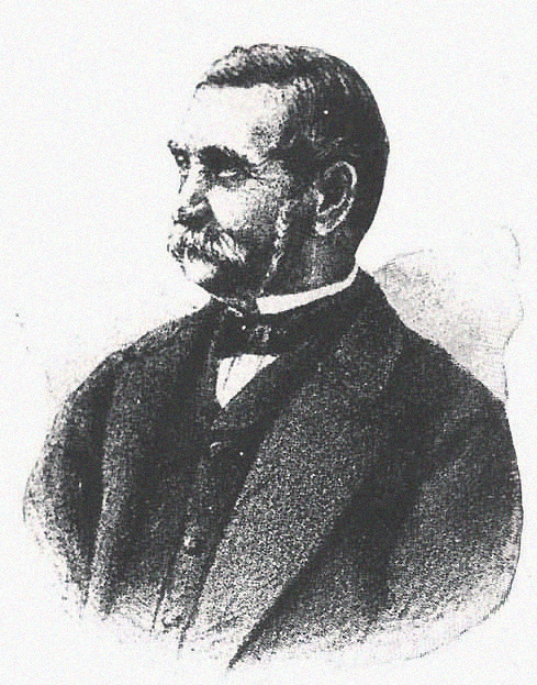 Manuel Camilo Vial Formas (Chile) Manuel Camilo Vial